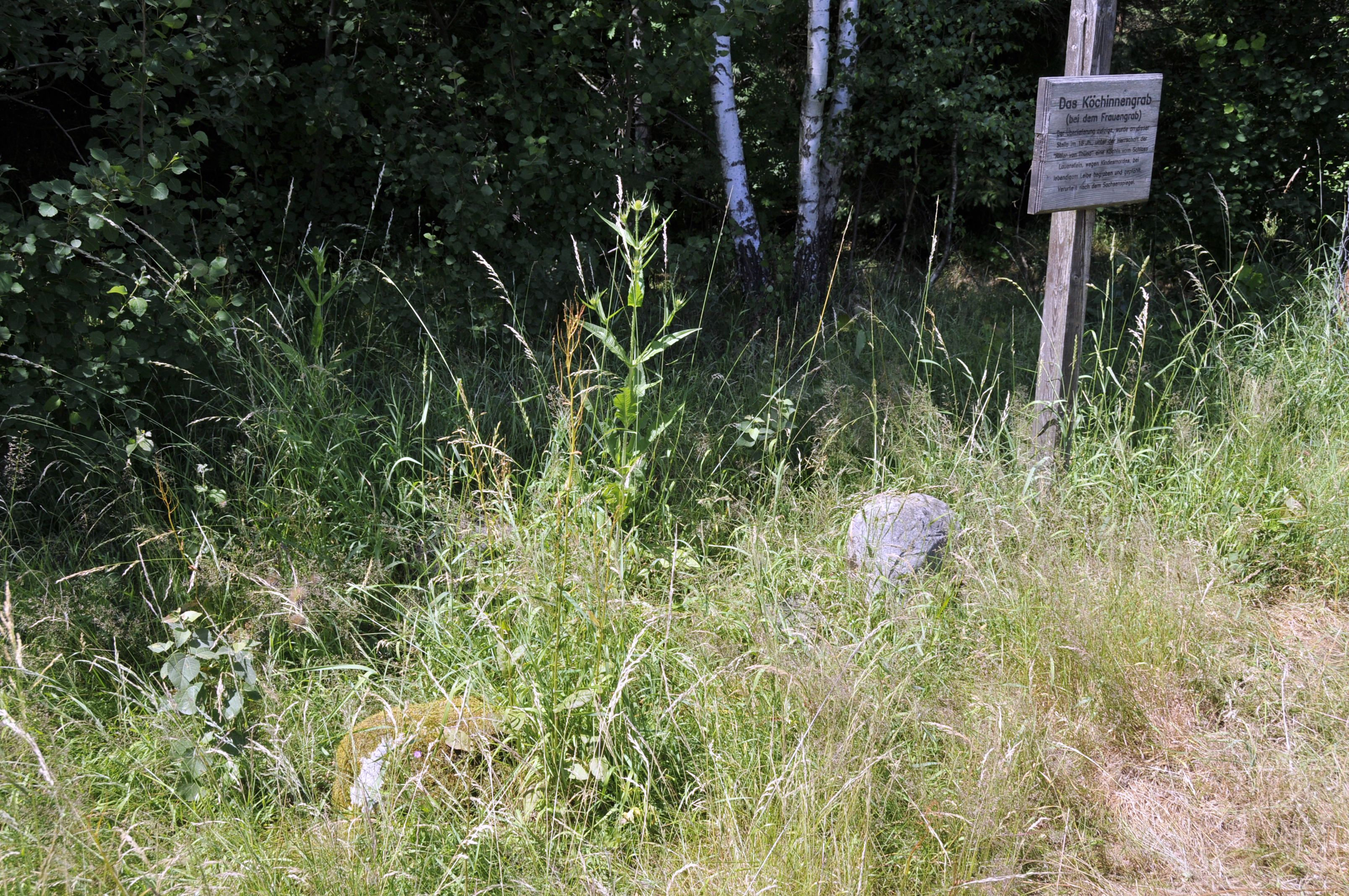 Königinnengrab bei Lauenstein